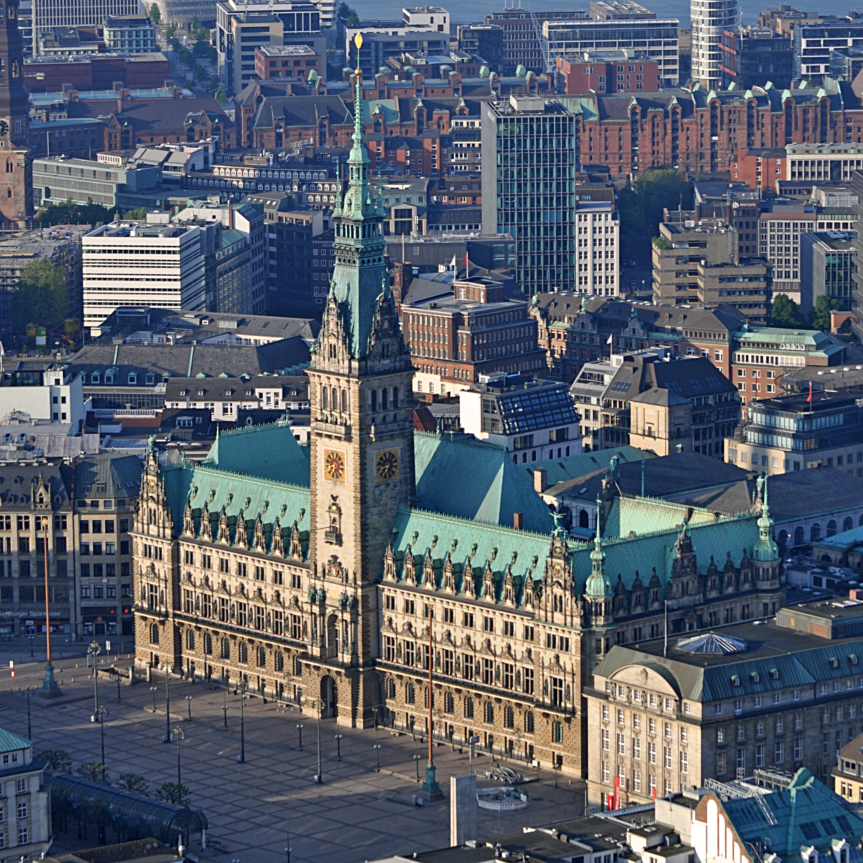 Das Hamburger Rathaus in Hamburg-Altstadt. This is a photograph of an architectural monument.